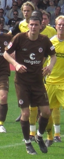 Der Fußballspieler Ralph Gunesch vom FC St. Pauli beim Spiel gegen Alemania Aachen vom 11. Mai 2008